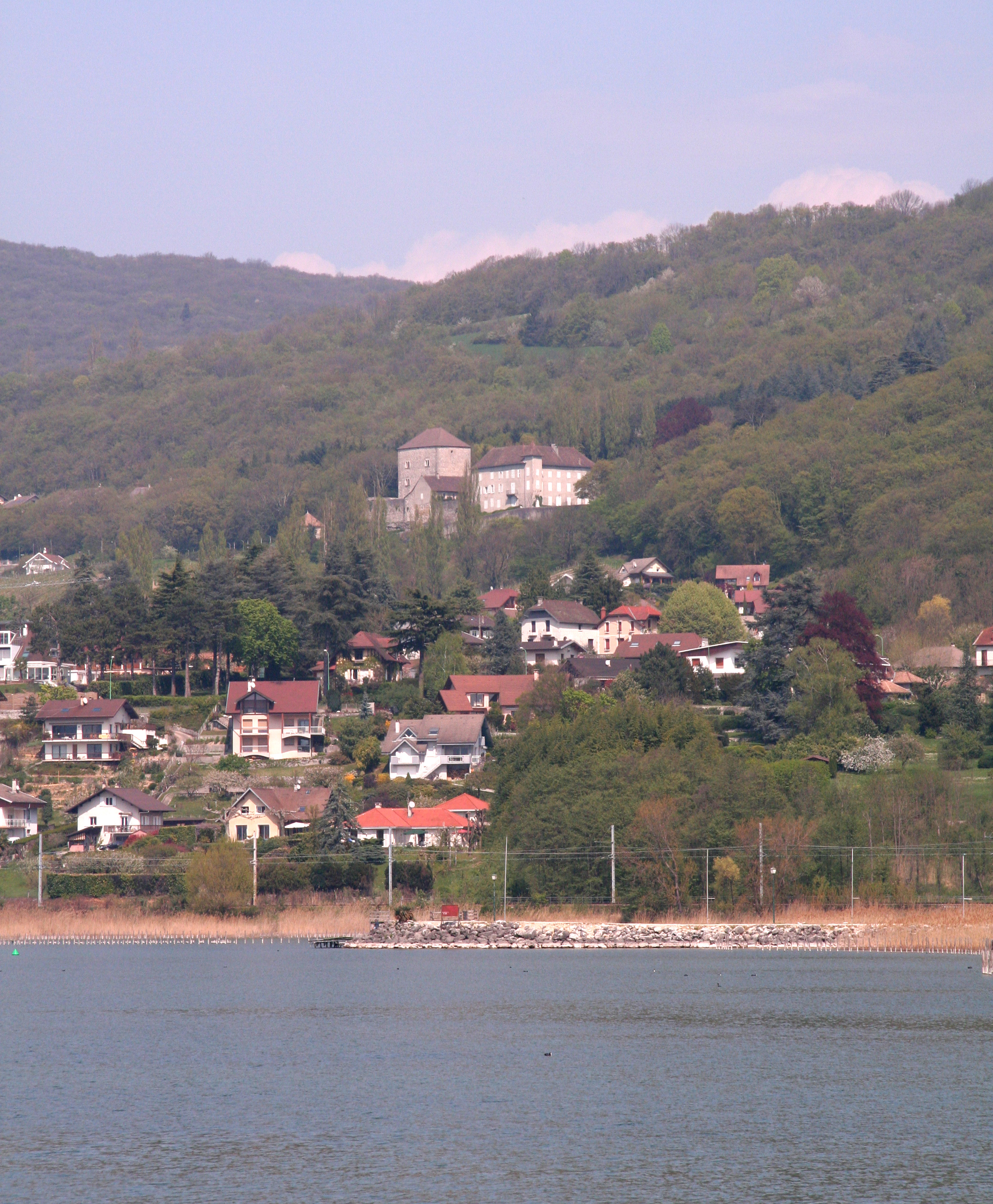 Château de Saint-Innocent